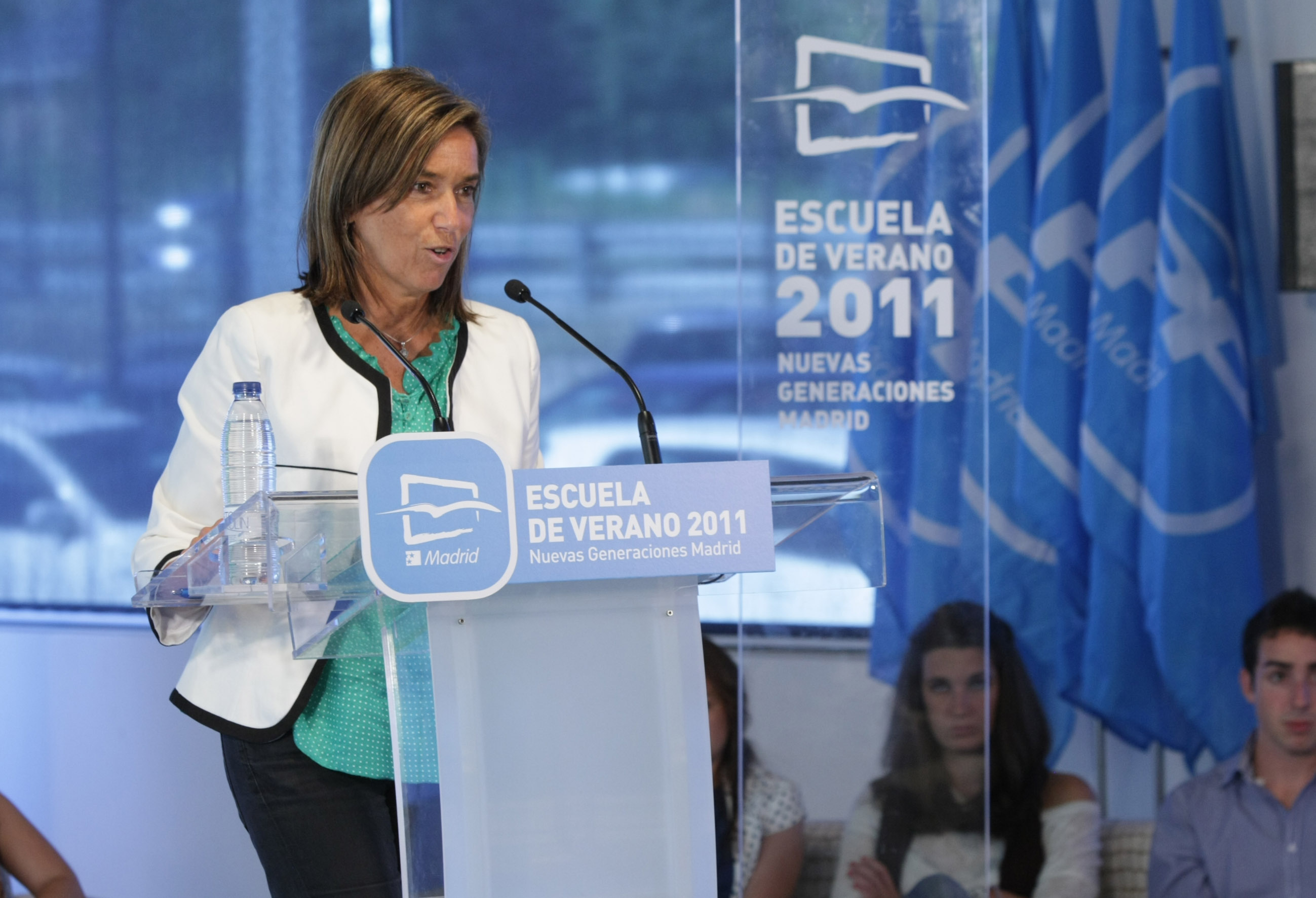 Ana Mato en la Escuela de Verano de NNGG del PP de Madrid 2011